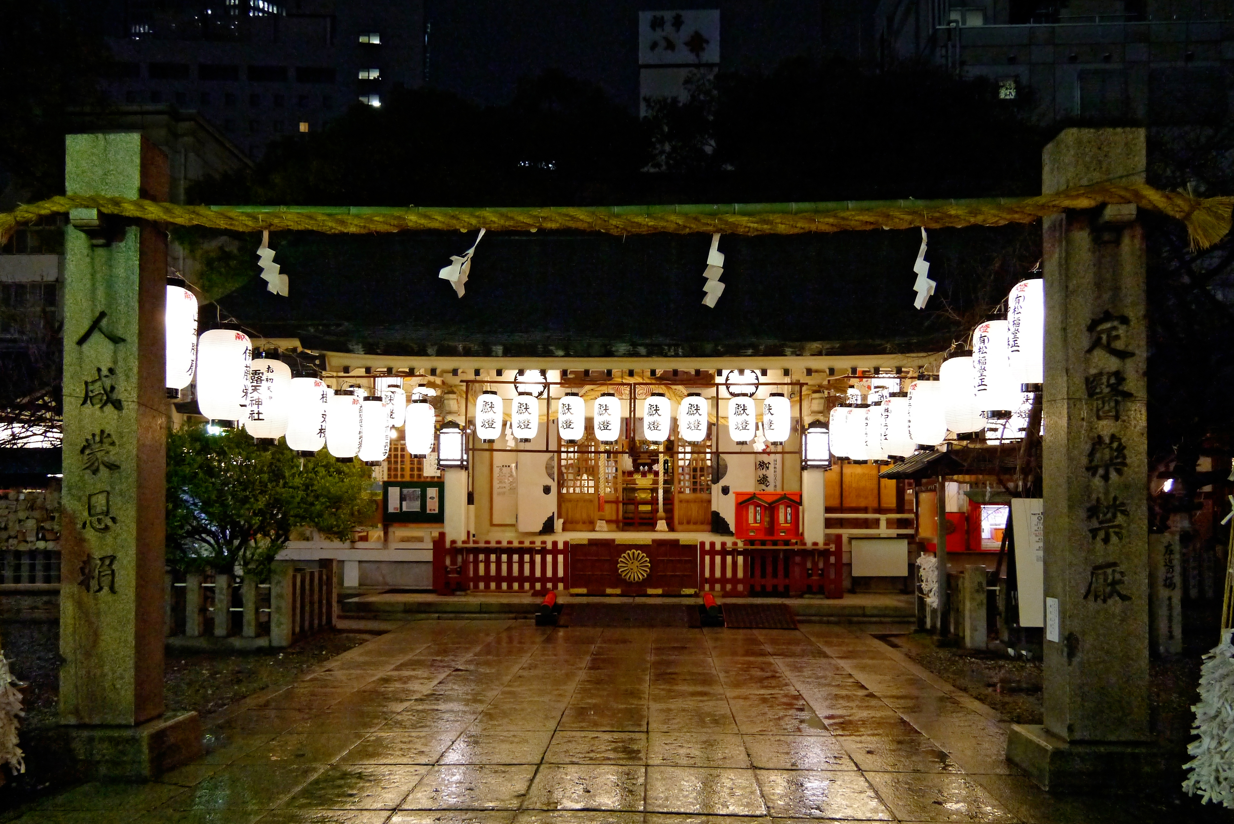 Tsuyu-tenjinsha (露天神社), Osaka, Osaka prefecture, Japan